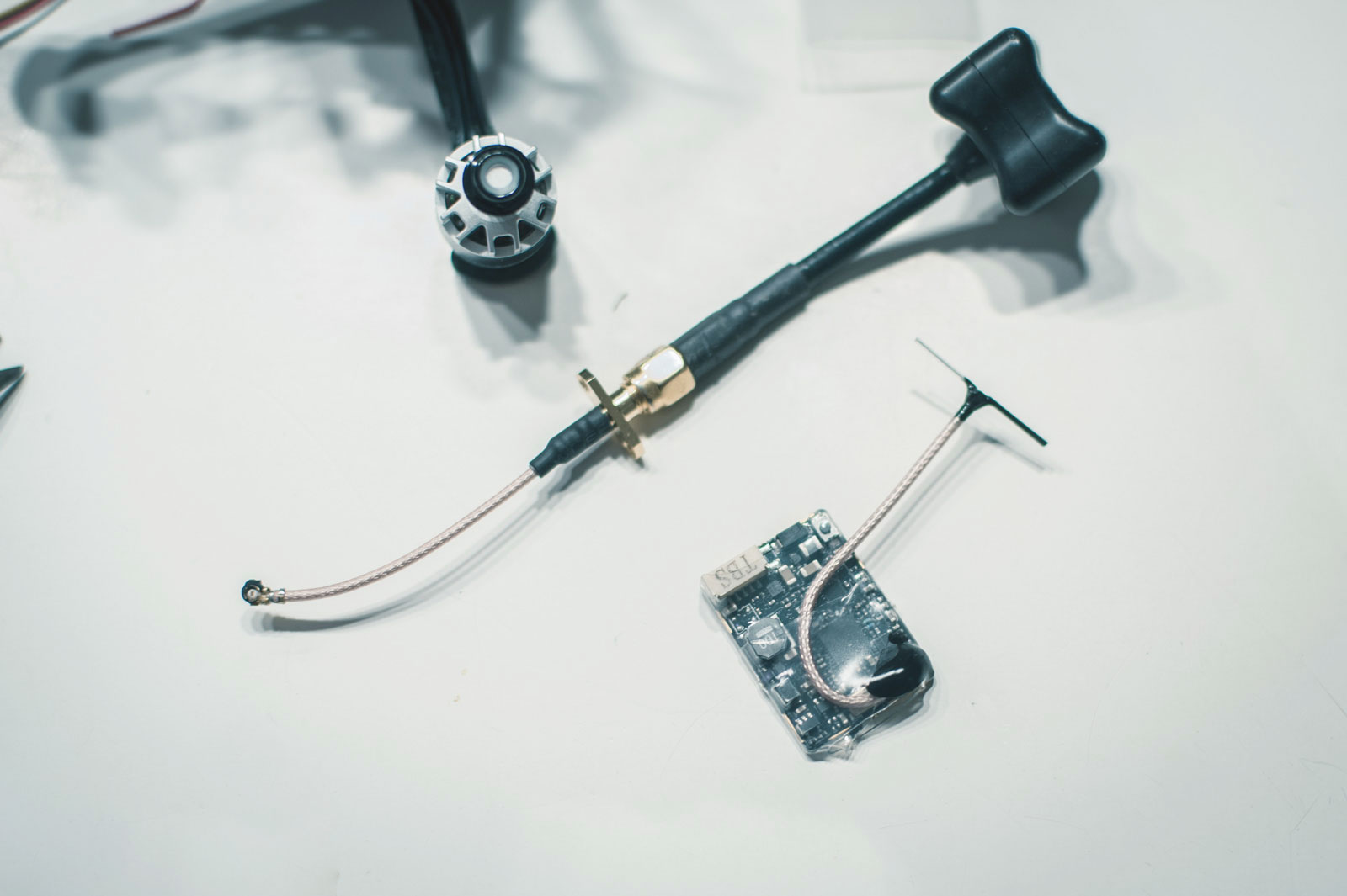 Zirkular Polarisierende Antenne (groß) und Lineare Dipol Antenne